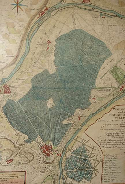 Fragment de la carte des bourgs et forrêt de Saint-Germain-en-Laye, levée et dessinée en 1705 par Nicolas de Fer.